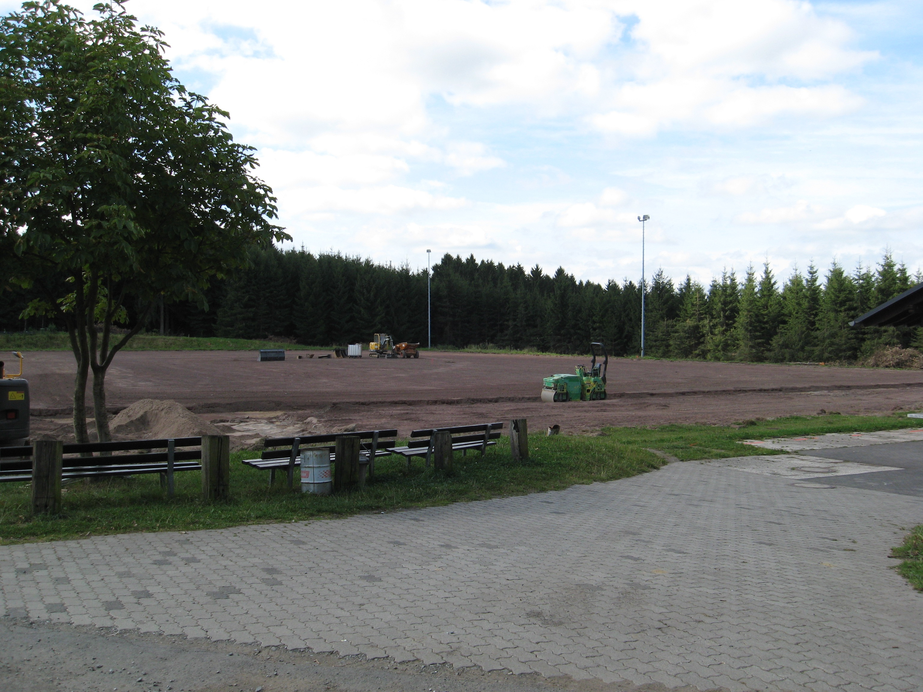 Der Wilnsdorf-Obersdorfer Sportplatz während seiner Modernisierung.